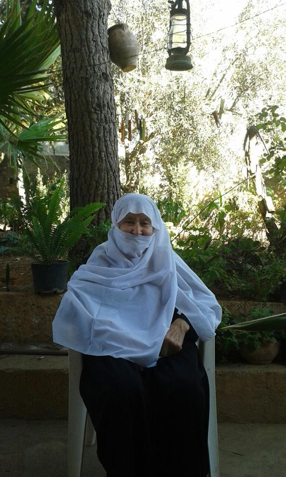 לבוש מסורתי של אשה דרוזית